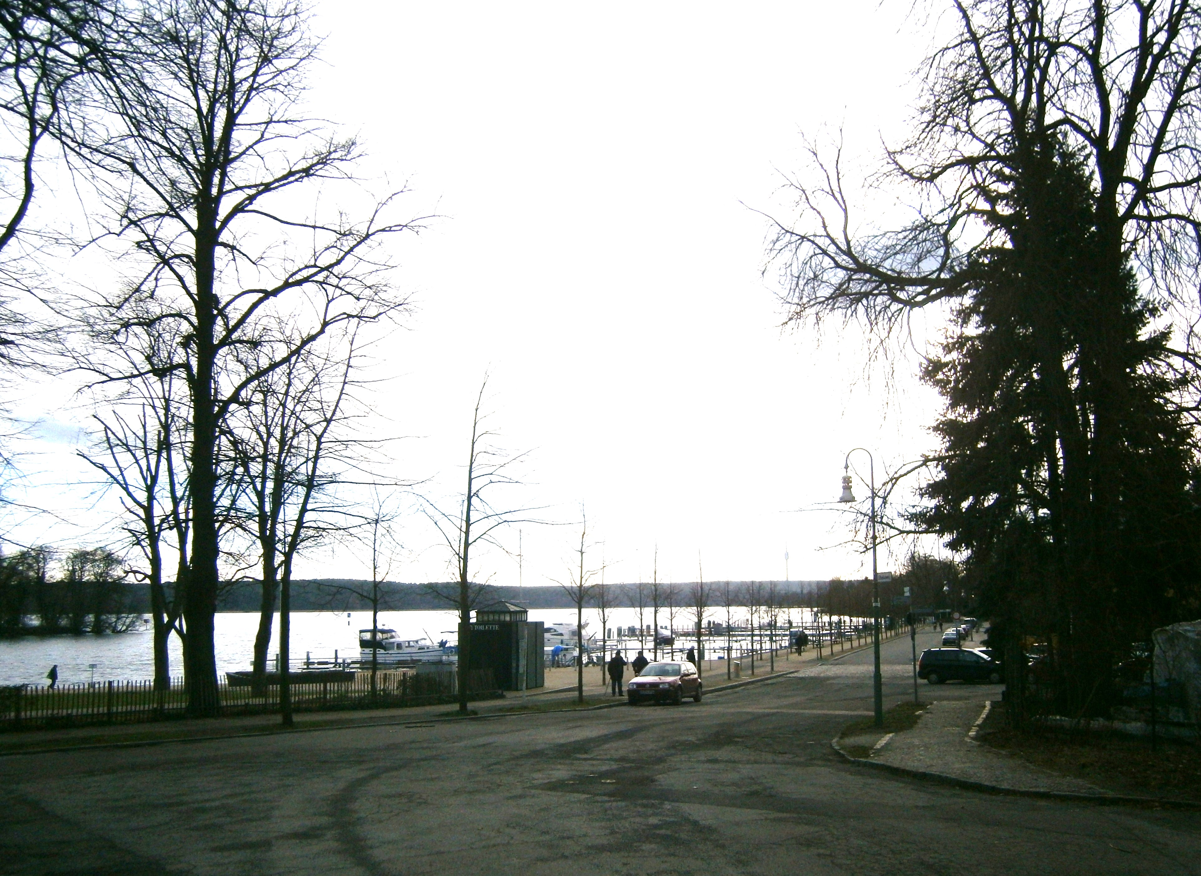 Imchenplatz ist eine Straße im Ortsteil Kladow von Berlin im Zuge der Imchenallee und gegnüber der Insel Imchen.